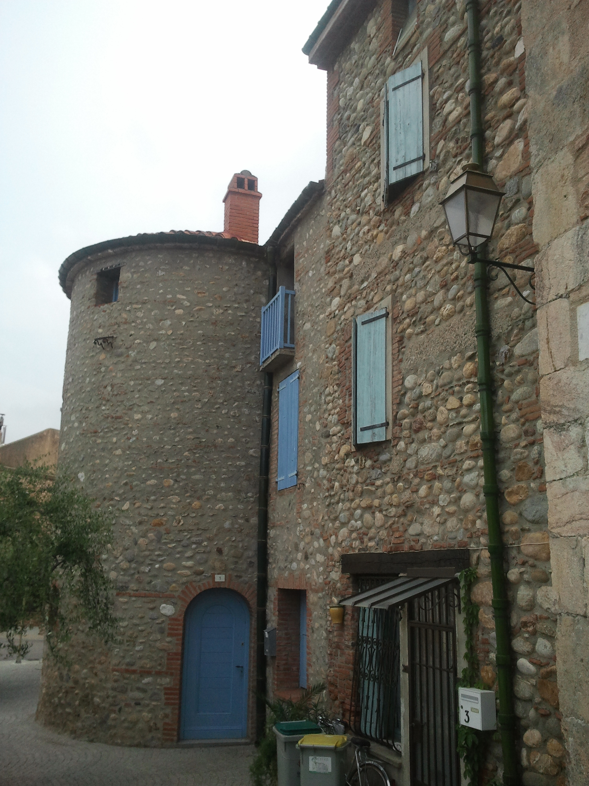 Tour médiévale à Corneilla-la-Rivière